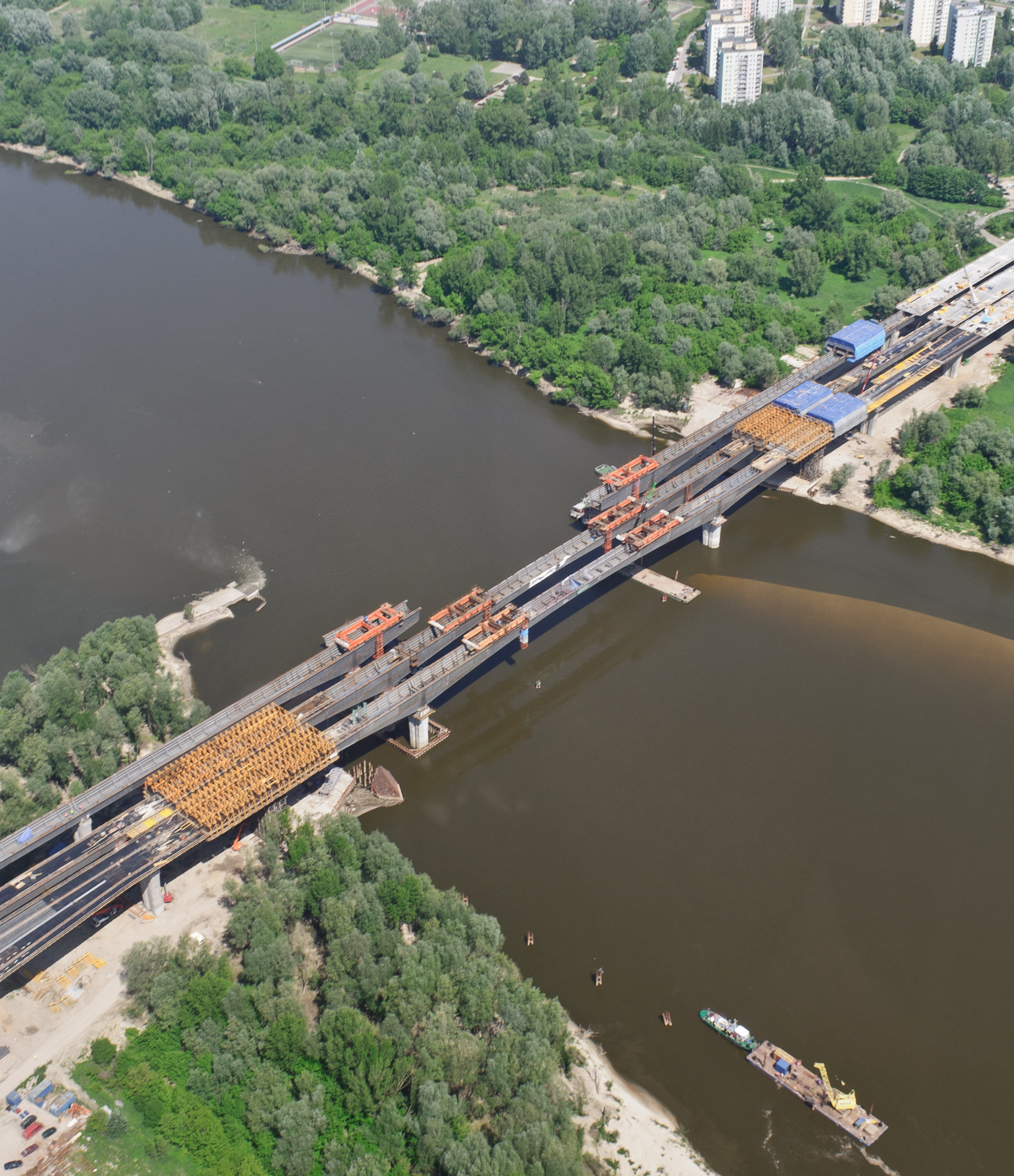 Most Północny w Warszawie z zainstalowanymi dwoma przęsłami, widok od strony południowej - zdjęcie lotnicze.